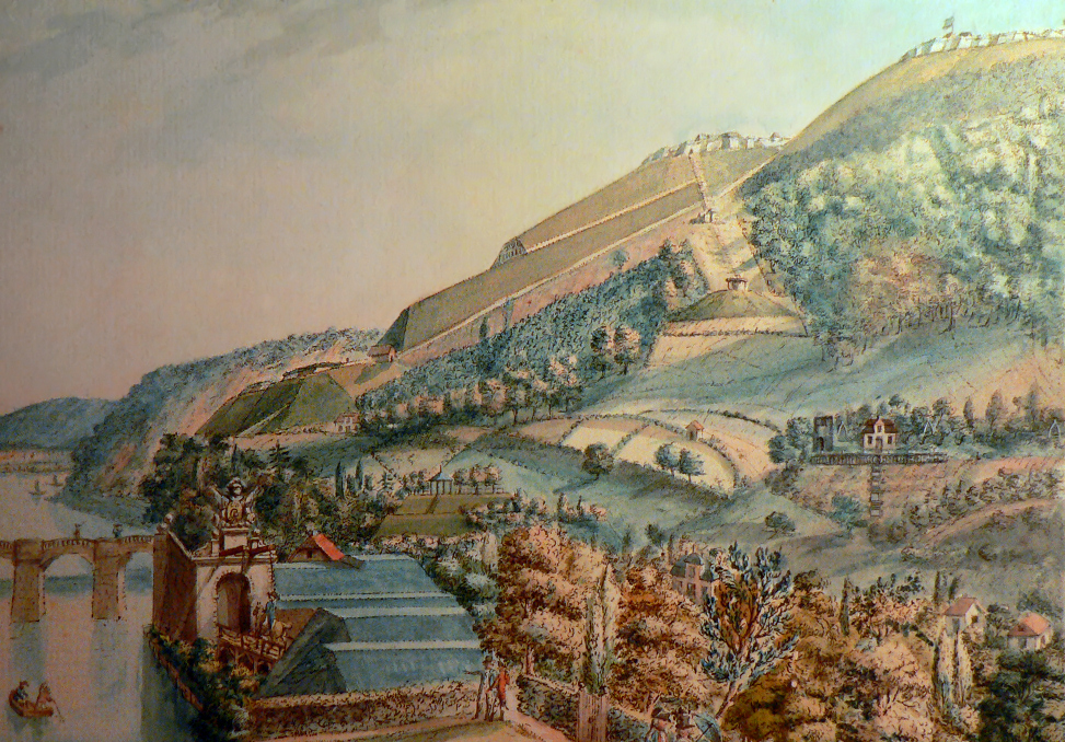 Der Klüt mit seinen drei Forts und der vierten Befestigungsanlage direkt am Weserufer, Blick von Norden